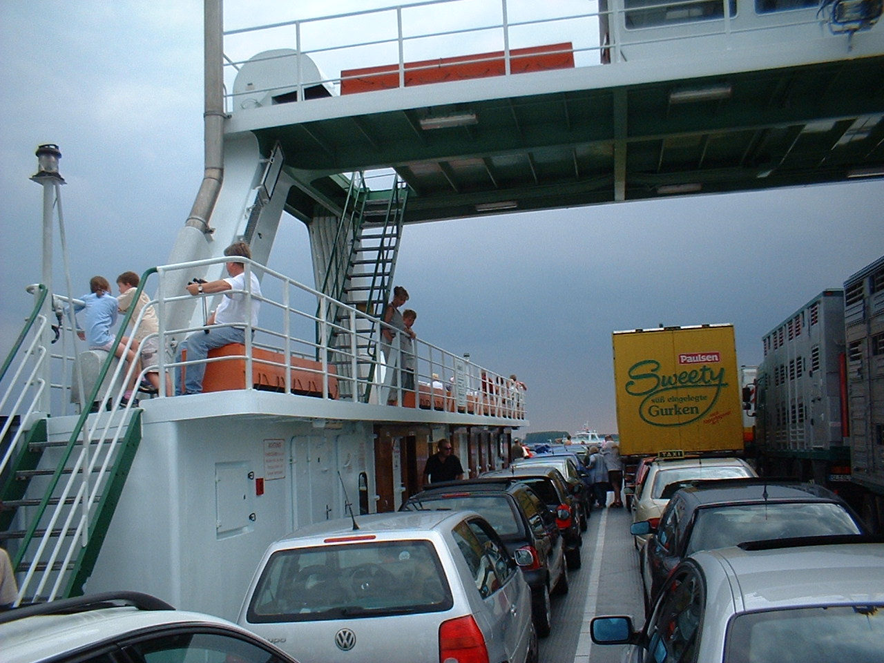 Elbfähre Glückstadt - Wischhafen